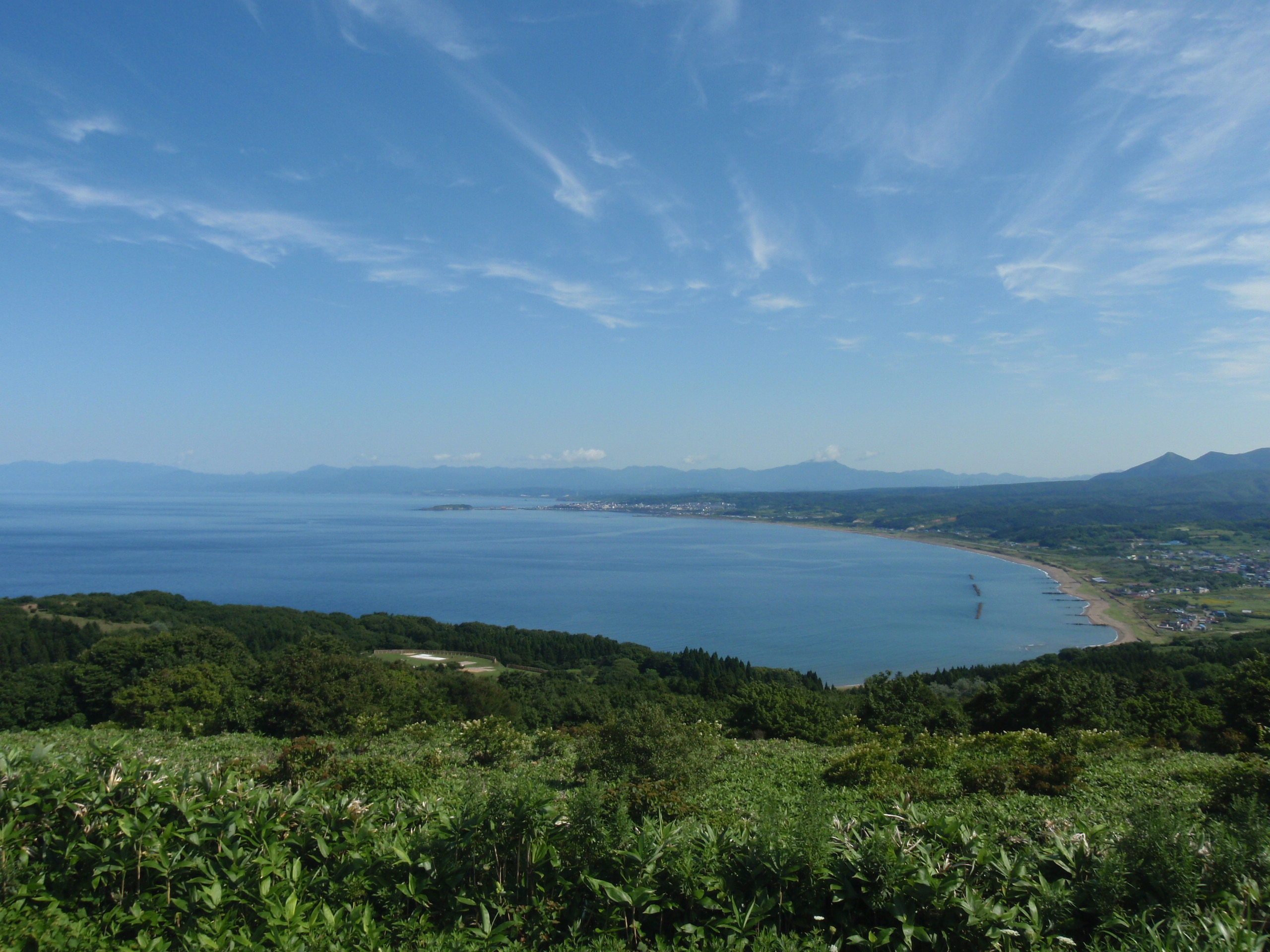 夷王山から見る内郷浜。手前上ノ国町、奥江差町。